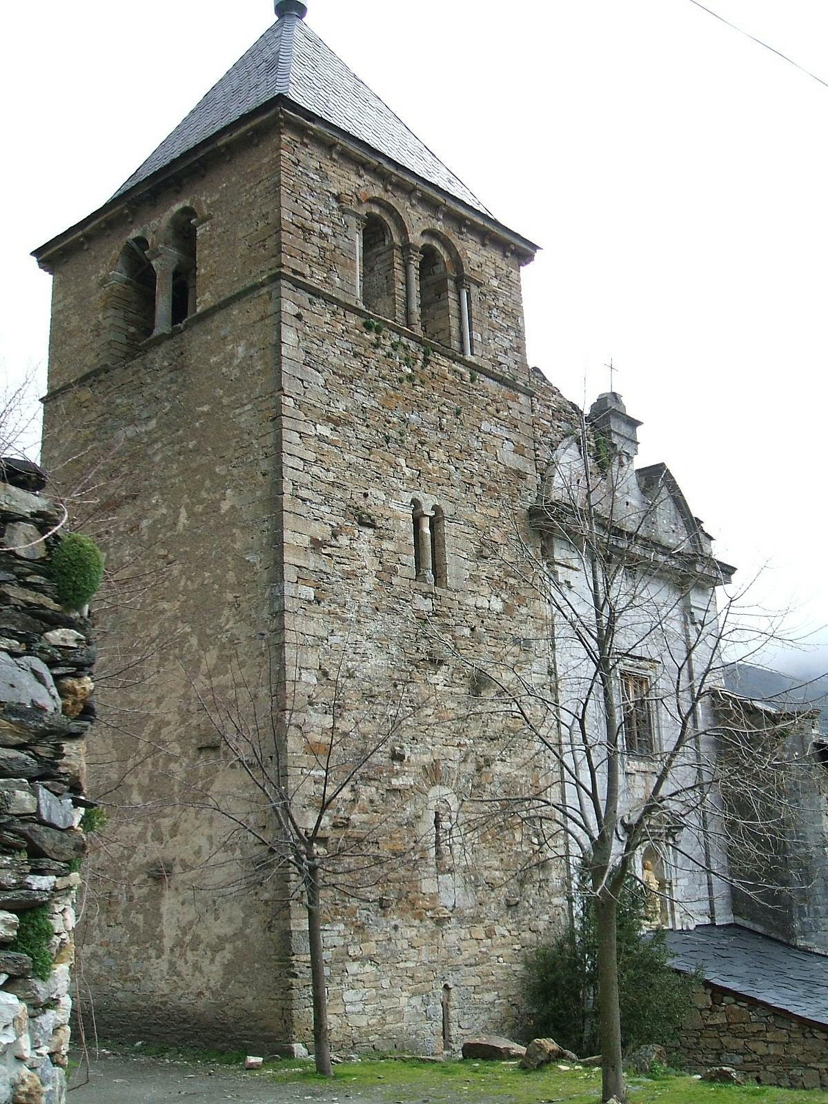 Iglesia del ex Monasterio de San Pedro de Montes, en Montes de Valdueza, El Bierzo, León, España